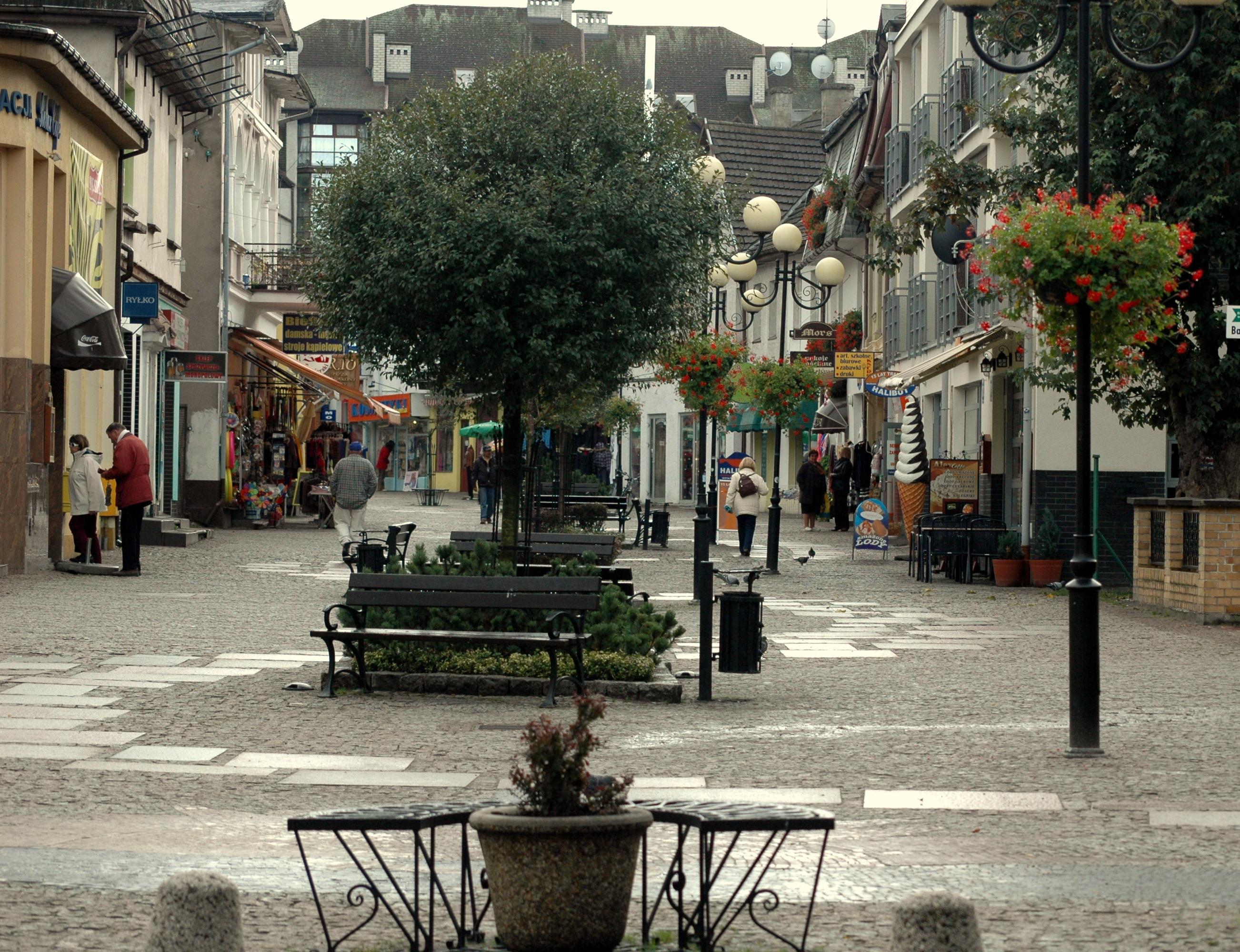 Deptak Światowida w Międzyzdrojach